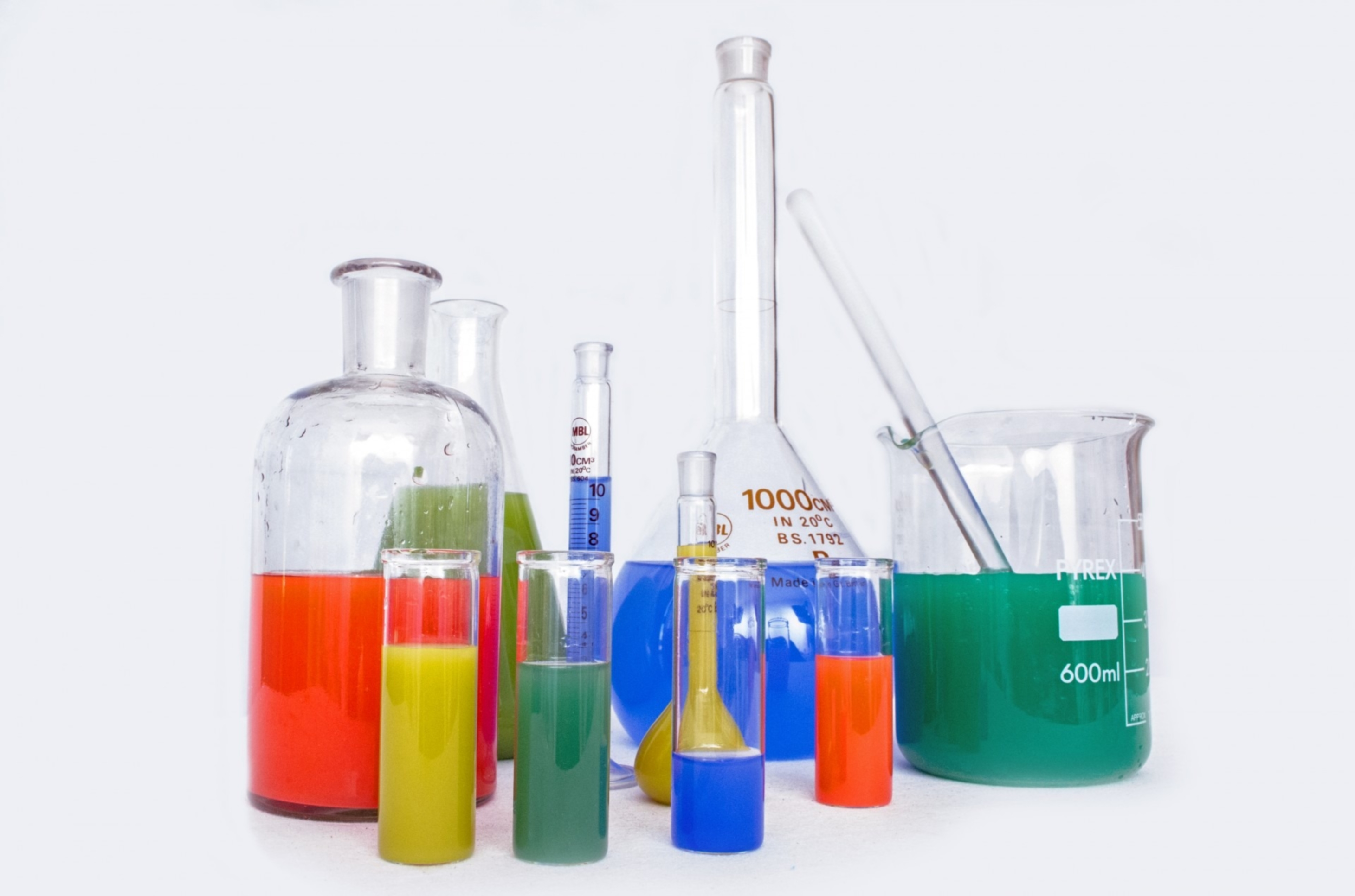 Zdjęcie przedstawiające naczynia laboratoryjne ze szkła kwarcowego English | Polski | +/−